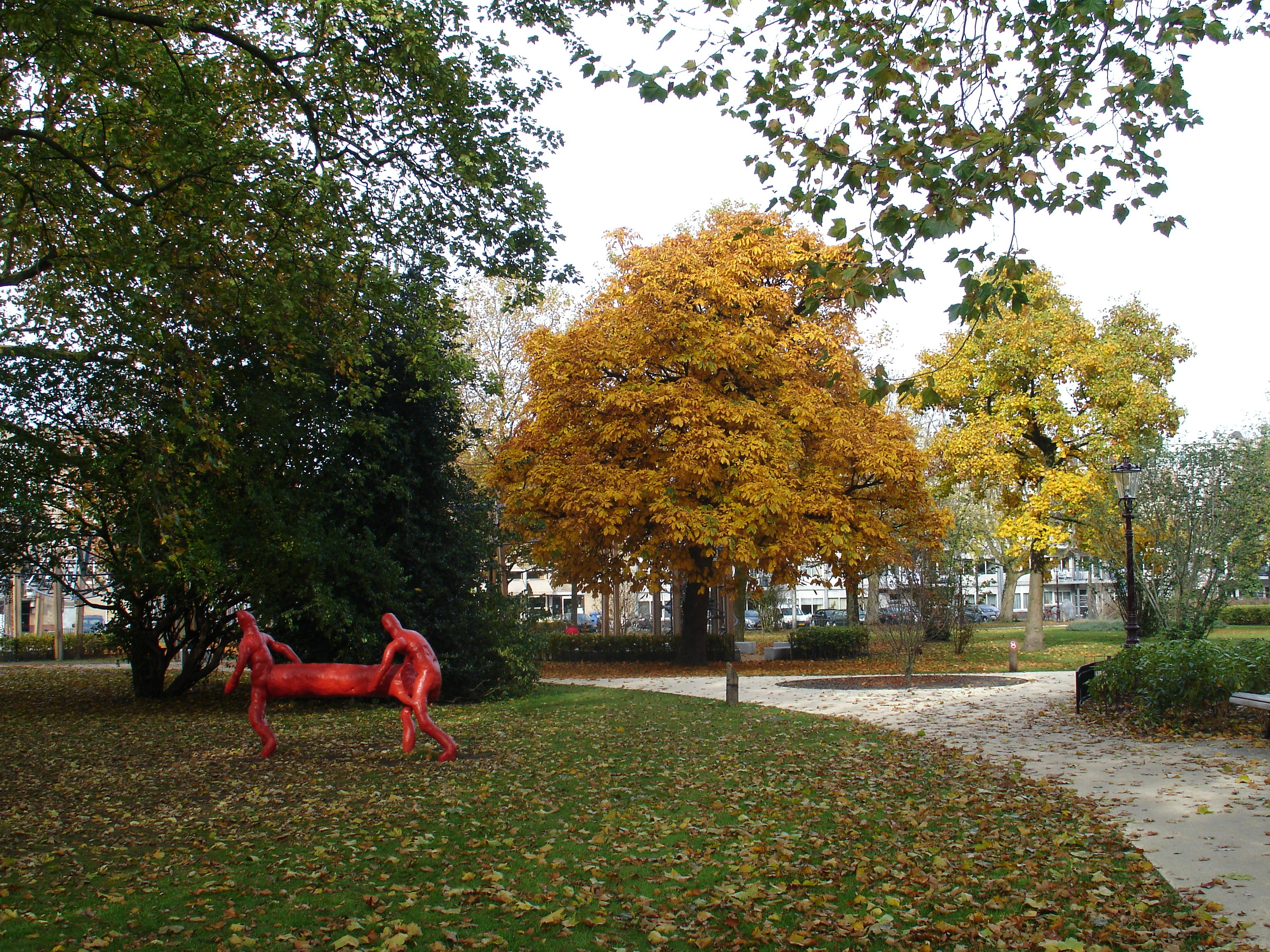 Het Prins Hendrikplantsoen in Amsterdam.